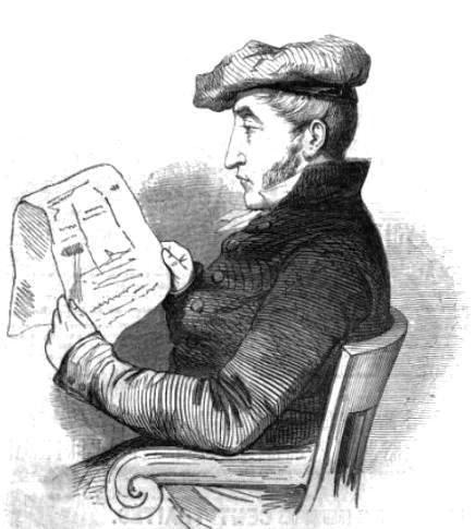 Polonceau (1778-1847) "Croquis exécuté d'après nature, à Grignon, par M. Bella fils."